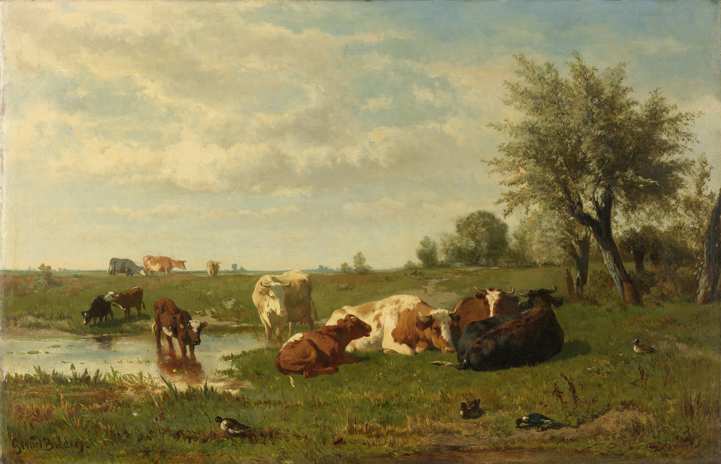 Landschap met koeien in de weide, op de voorgrond een paar eenden.